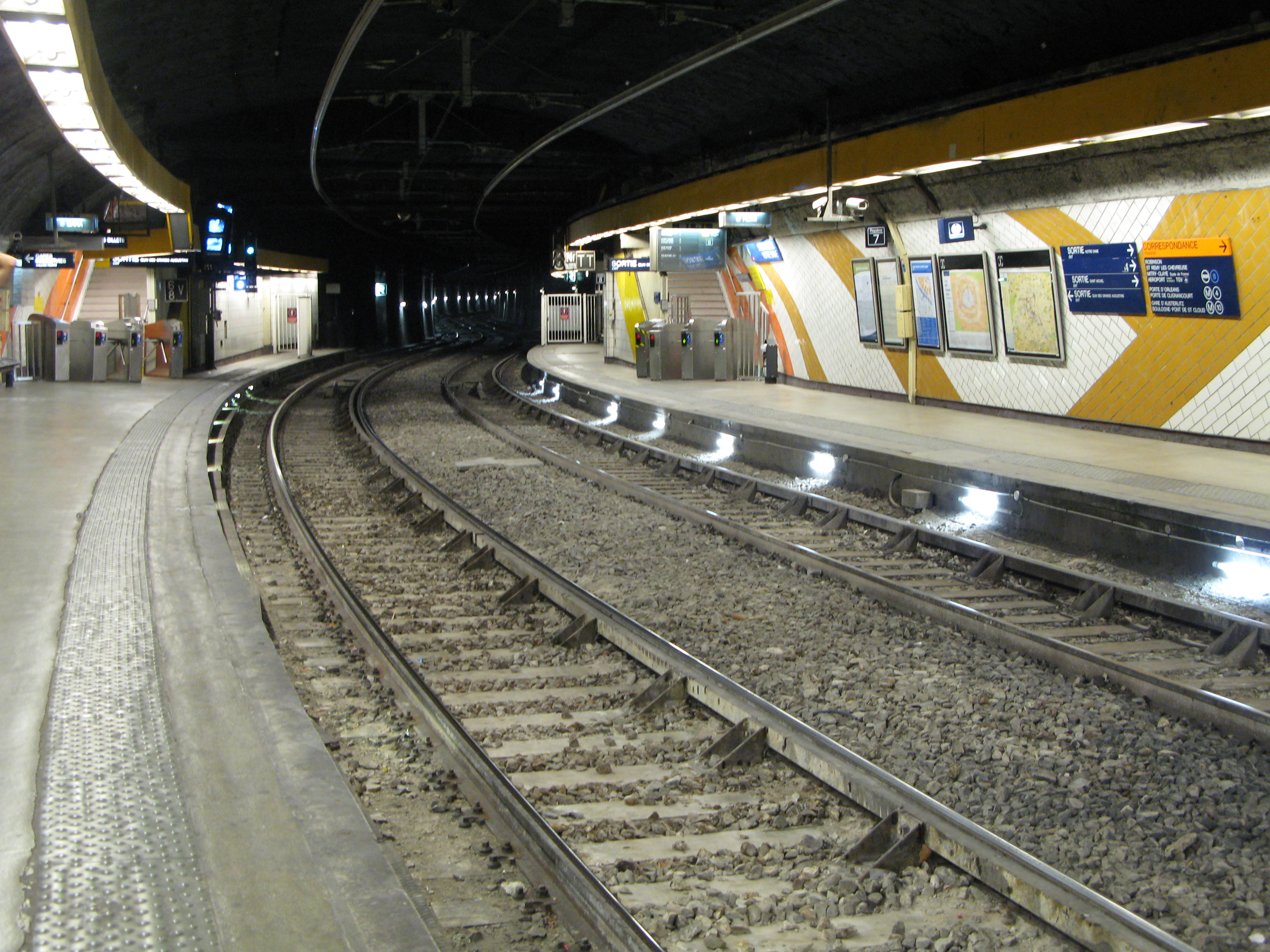 La gare Saint-Michel - Notre-Dame, ligne C du RER. Paris, France.